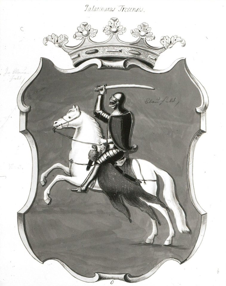 Беларуская (тарашкевіца): Герб Троцкага ваяводзтва (Troki) з Пагоняй (Pahonia)